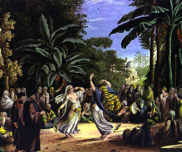 Danseuses au bord du Nil